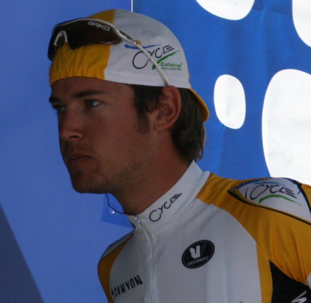 Bastiaan Giling aux Quatre jours de Dunkerque 2008